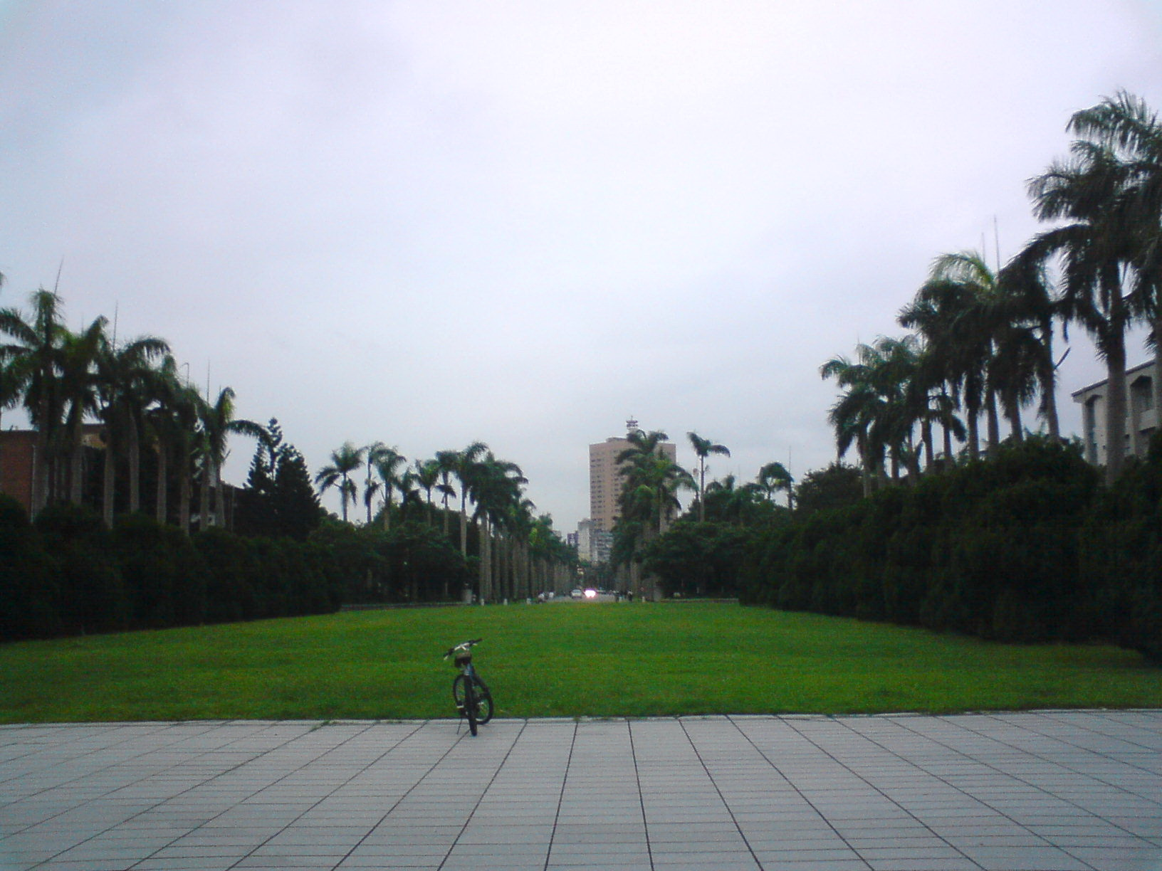 臺大總圖書館前草坪。Bân-lâm-gú: Tâi-tāi Tsóng-tôo-su-kuán tsiân tshó-pênn.